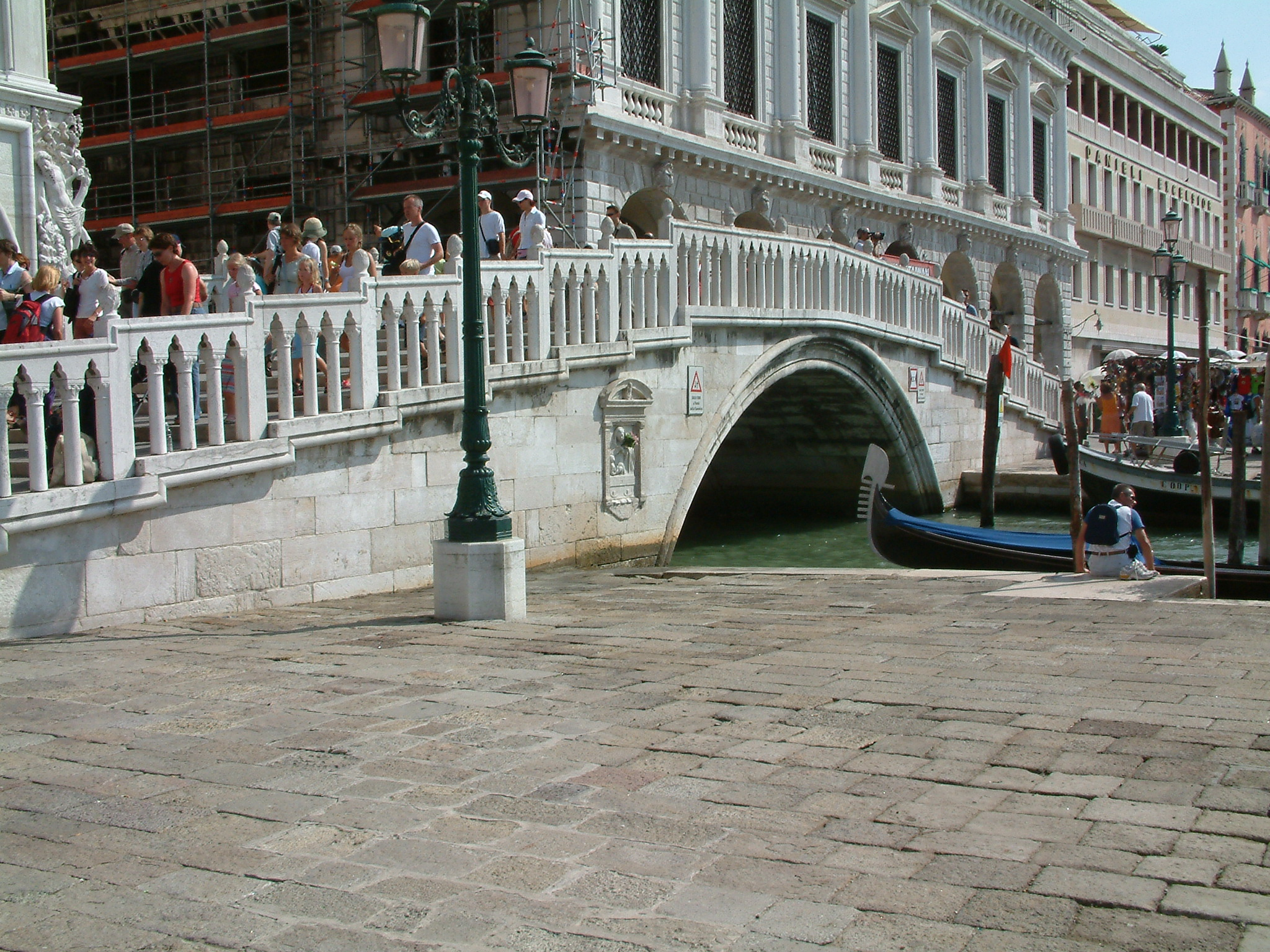 Venice, Riva degli Schiavoni, Ponte della Paglia. Photo by Maria Schnitzmeier. 2005-07-20